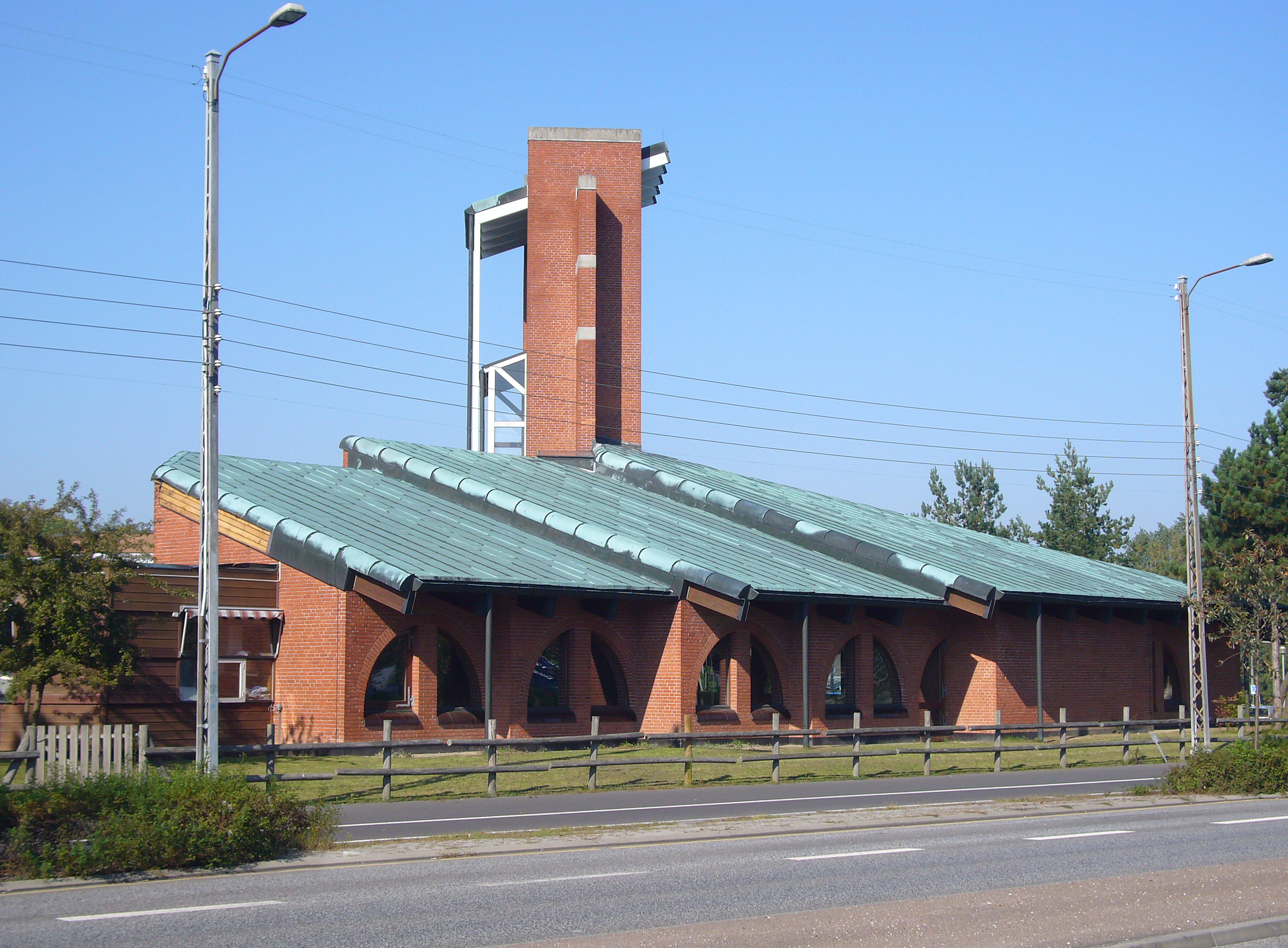 Karlslunde Strandkirke in Roskilde County, Denmark